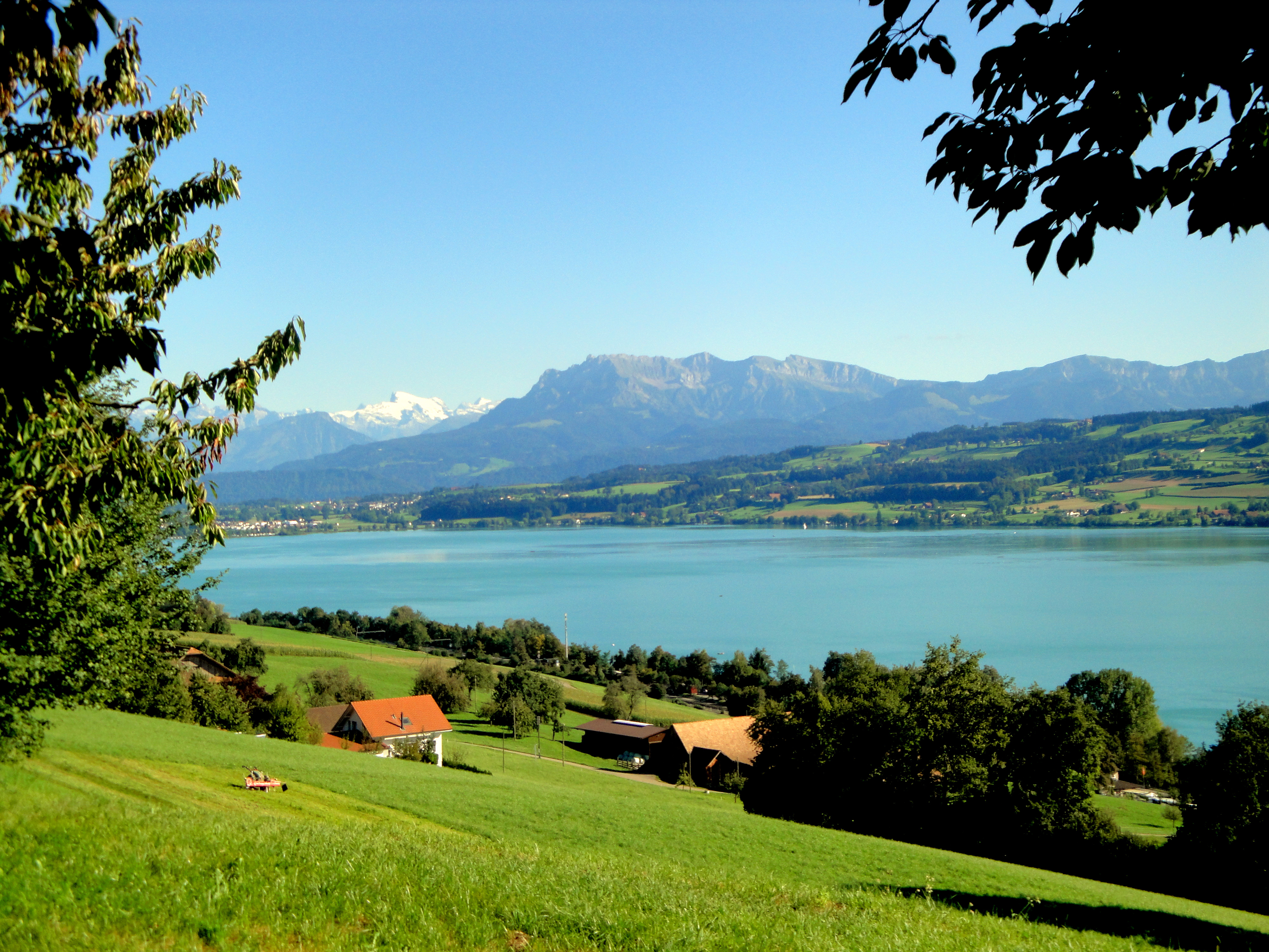 Blick auf Sempachersee, Pilatus und Titlis